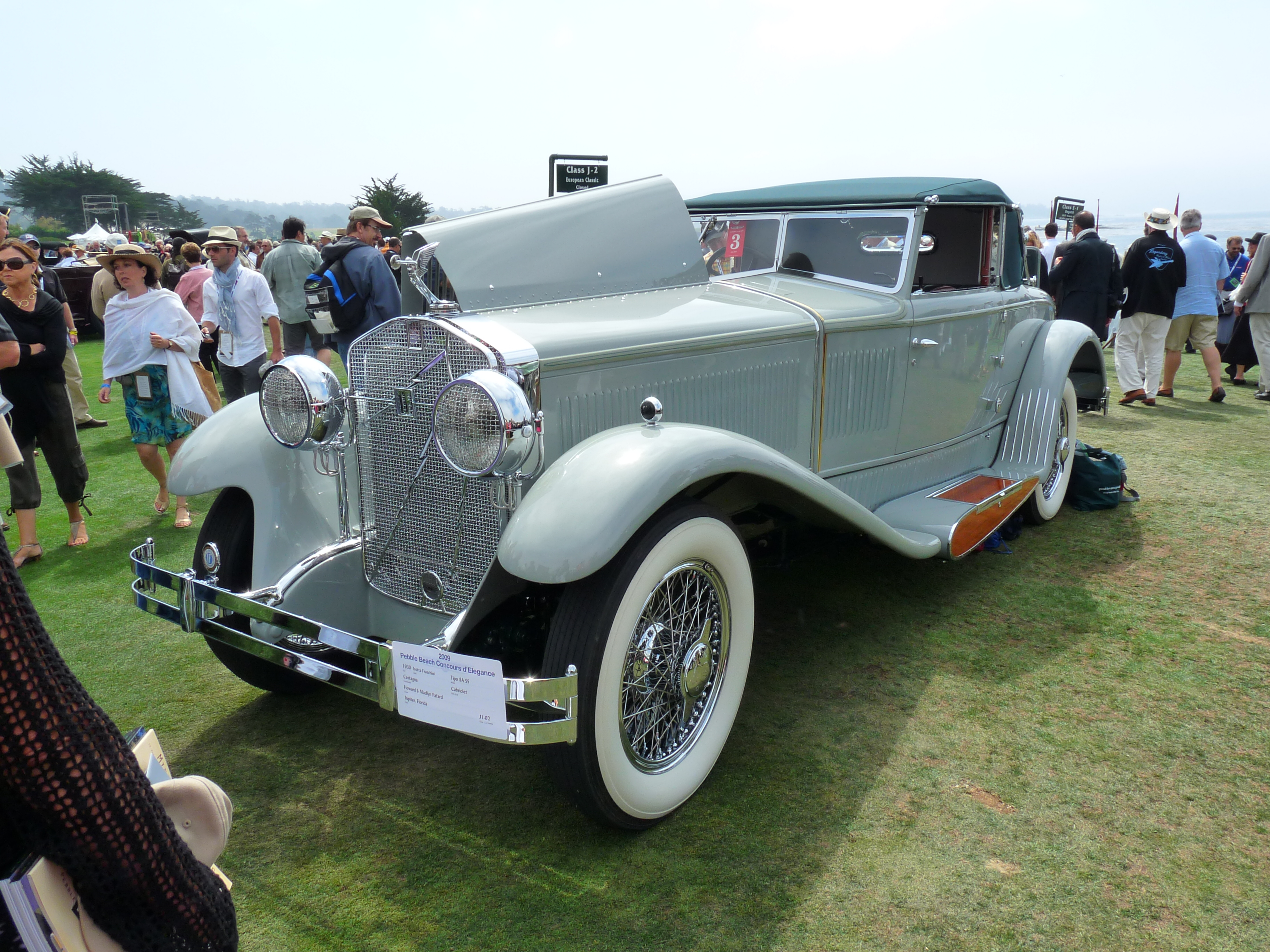 1930 Isotta Fraschini Tipo 8A SS Castagna Cabriolet